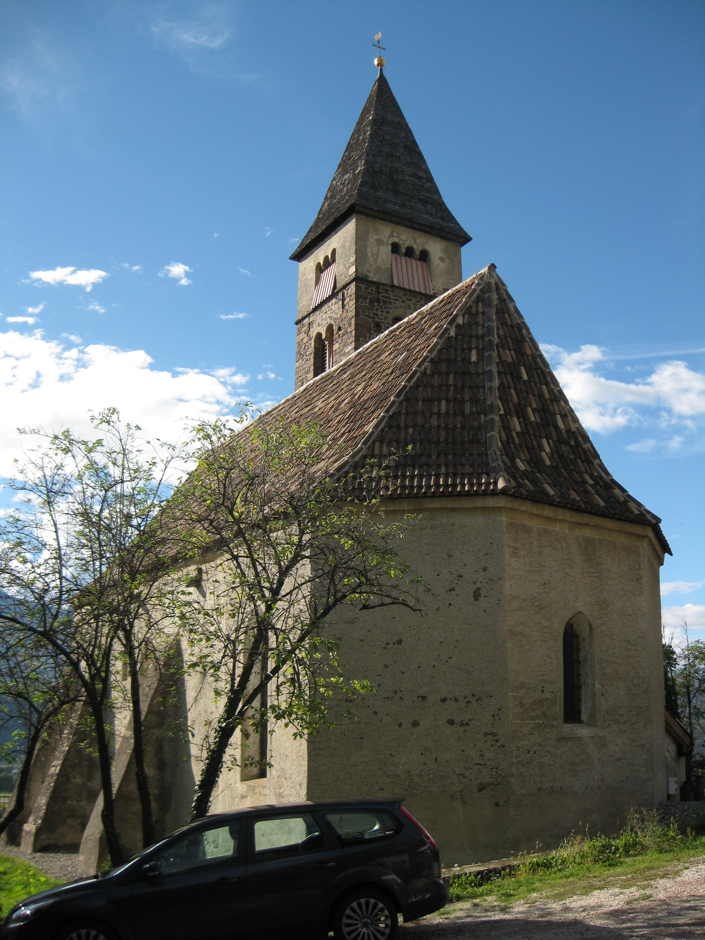 Kirche St. Jakob in der Gemeinde Leifers